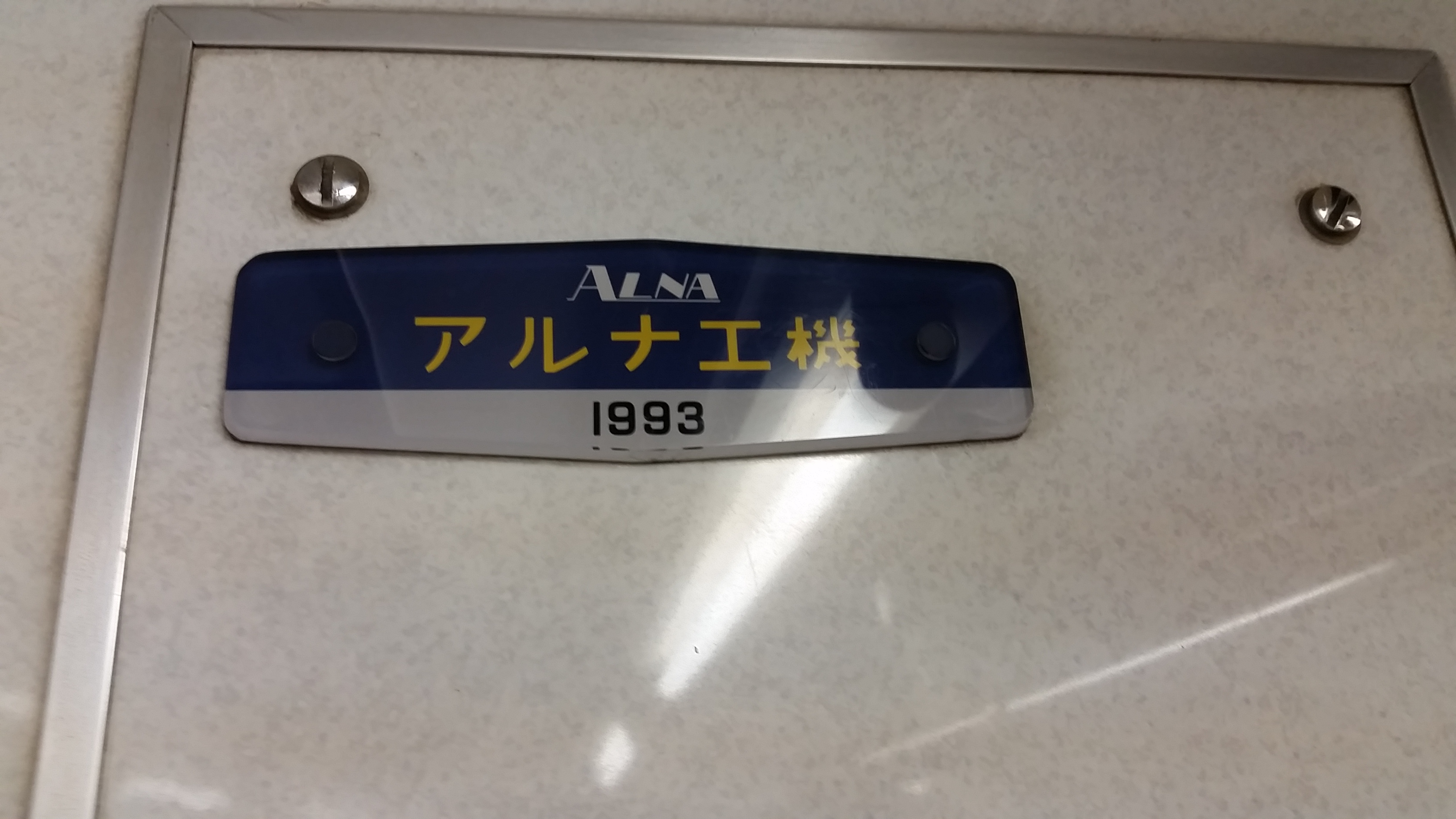 2016年2月21日 東武20000系車内にて撮影